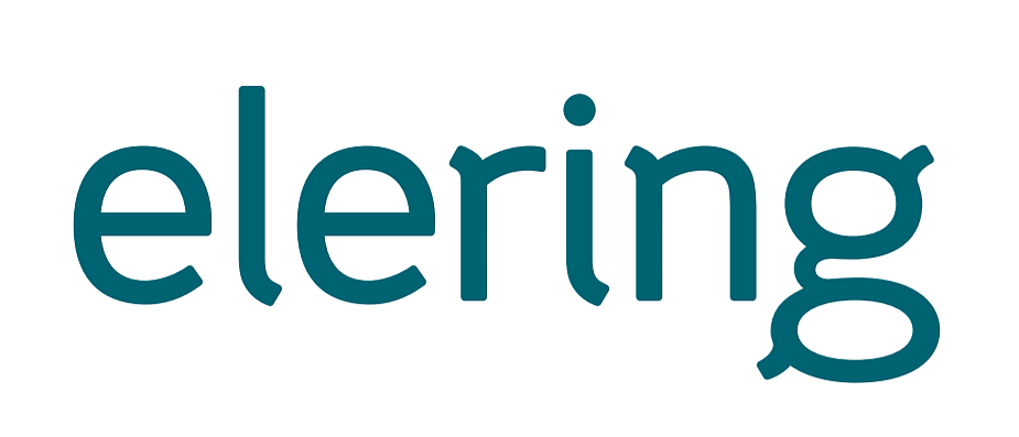 Eleringi logo